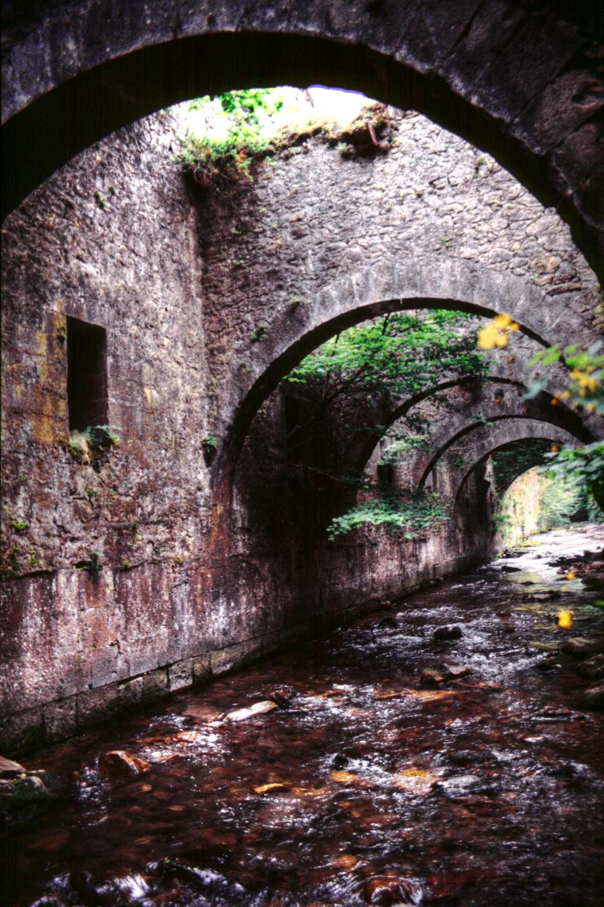 Fabrica de armas de Orbaiceta, Navarra